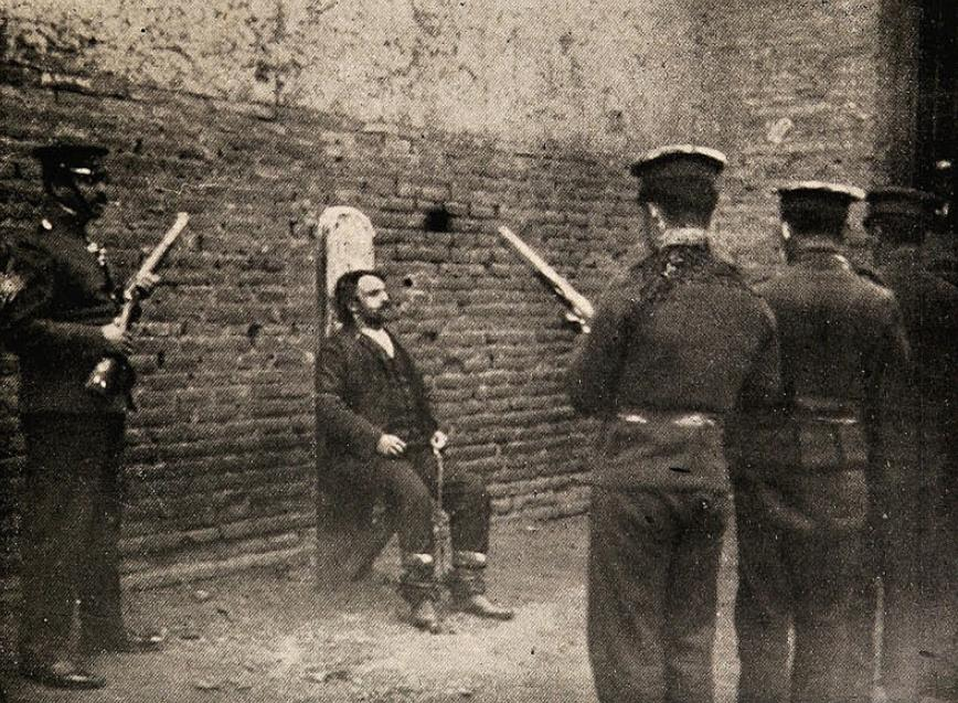 Ejecucion de Louis Amadeo Brihier Lacroix, también conocido por sus alias Émile Dubois, Emilio Dubois, Émile Murraley o Emilio Morales (Étaples, Pas-de-Calais, Francia, 29 de abril de 1867 - Valparaíso, Chile, 26 de marzo de 1907), fue un ladrón y asesino en serie francés.